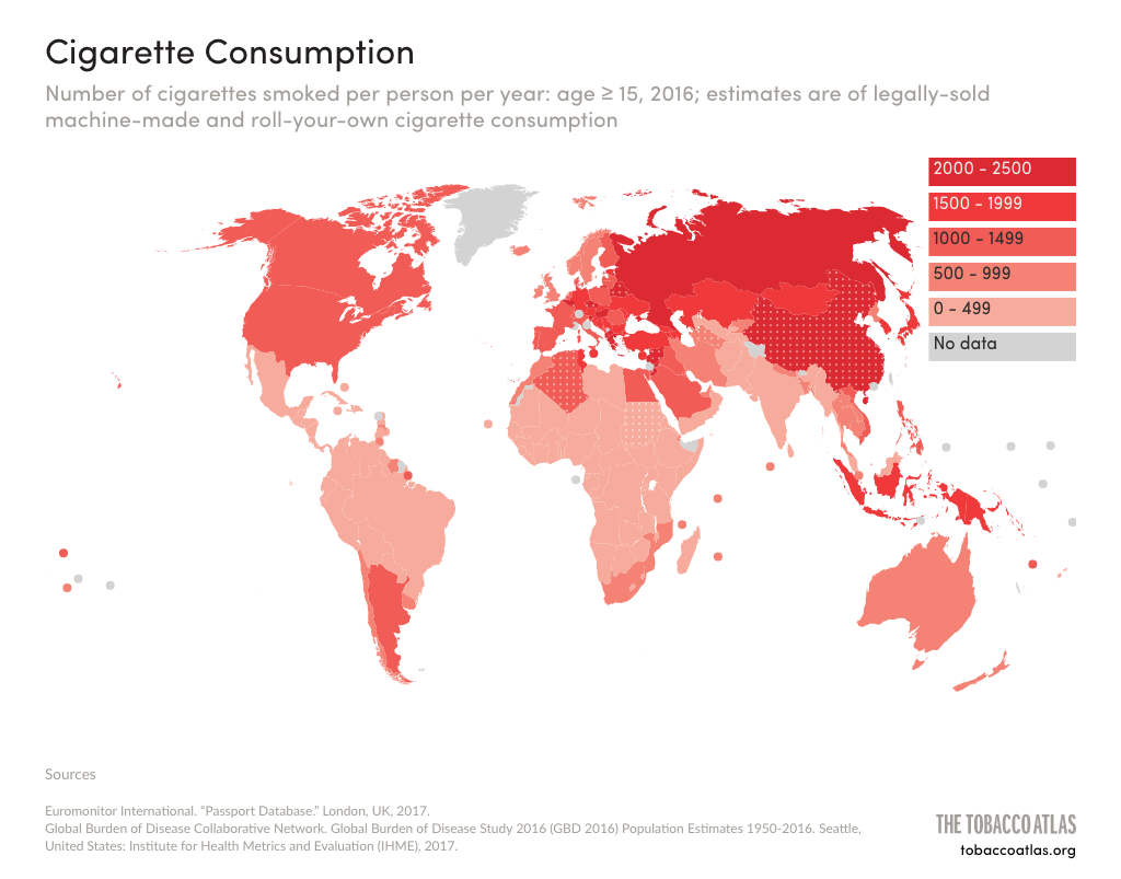 2016年の一人当たり（15歳以上９の合法に販売された機械製造の煙草の年間消費数 出典元：THE TOBACCO ATLAS＞issue＞Consumption American Cancer Society（アメリカがん協会）